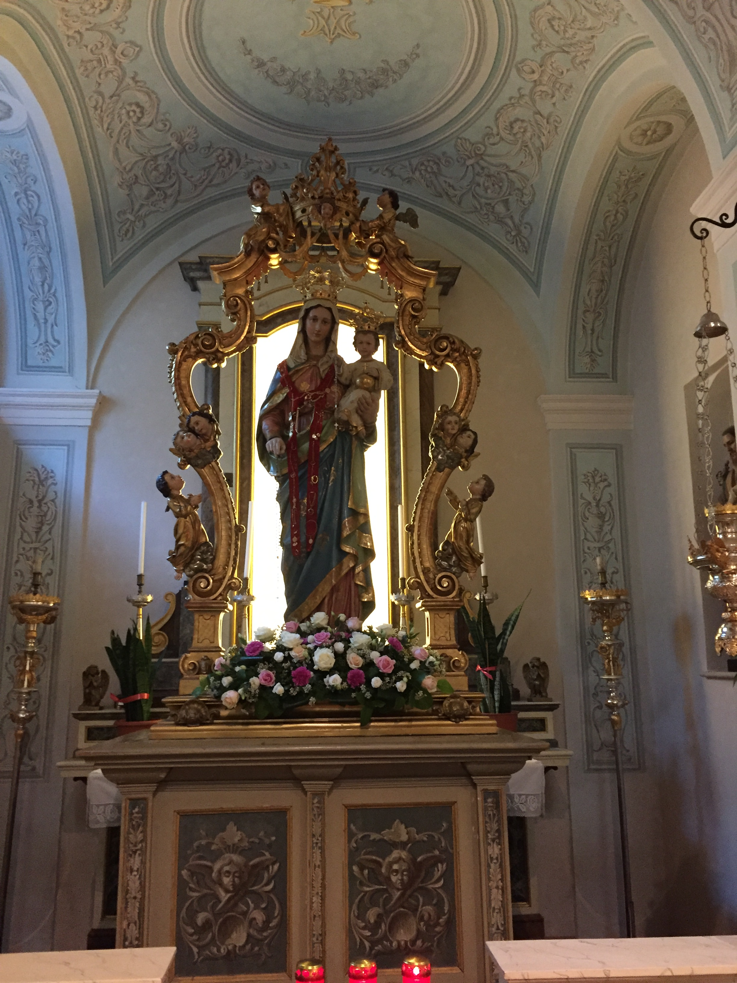 La statua della Madonna del Rosario della Chiesa di Roncello